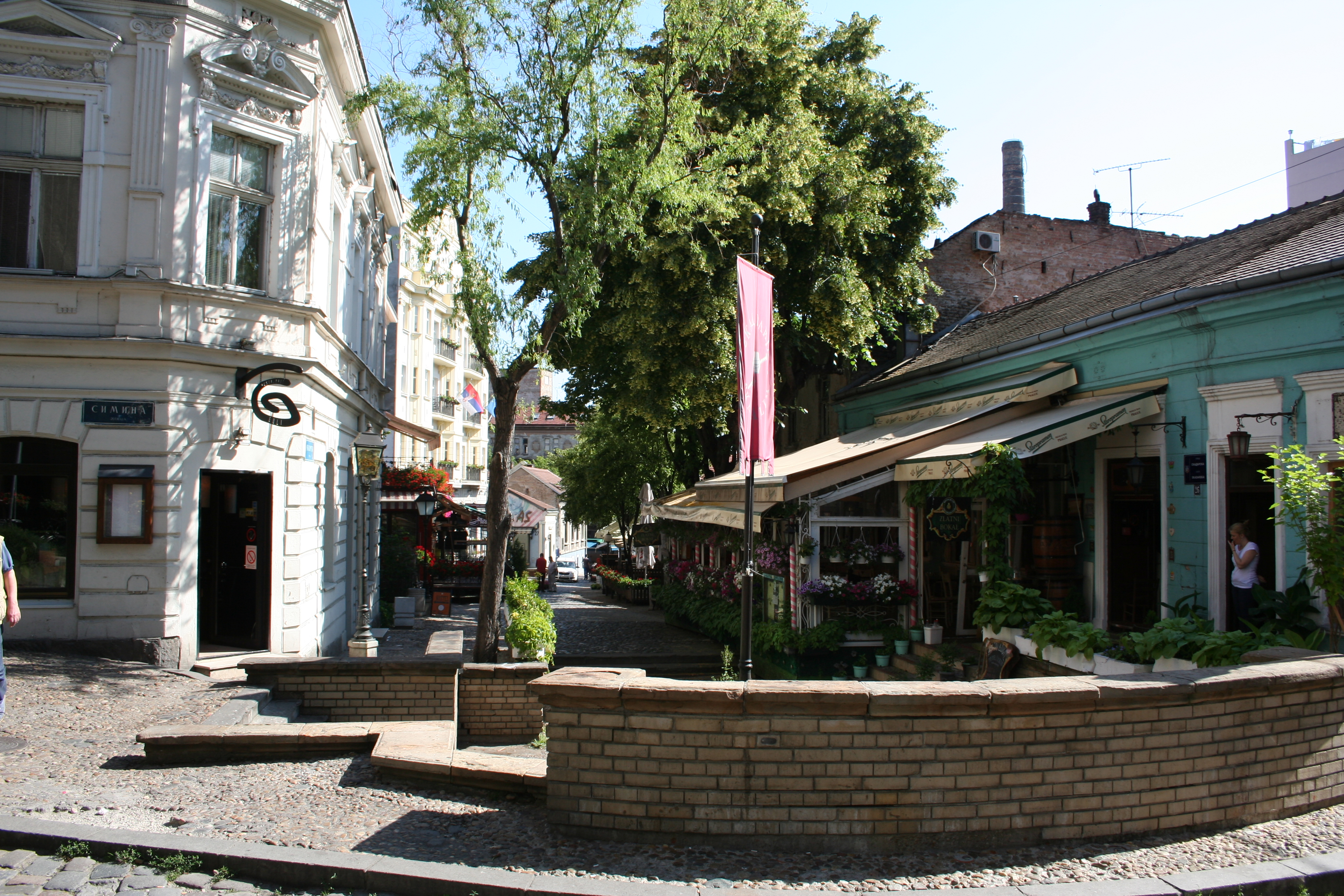 Skadarlijske kafane